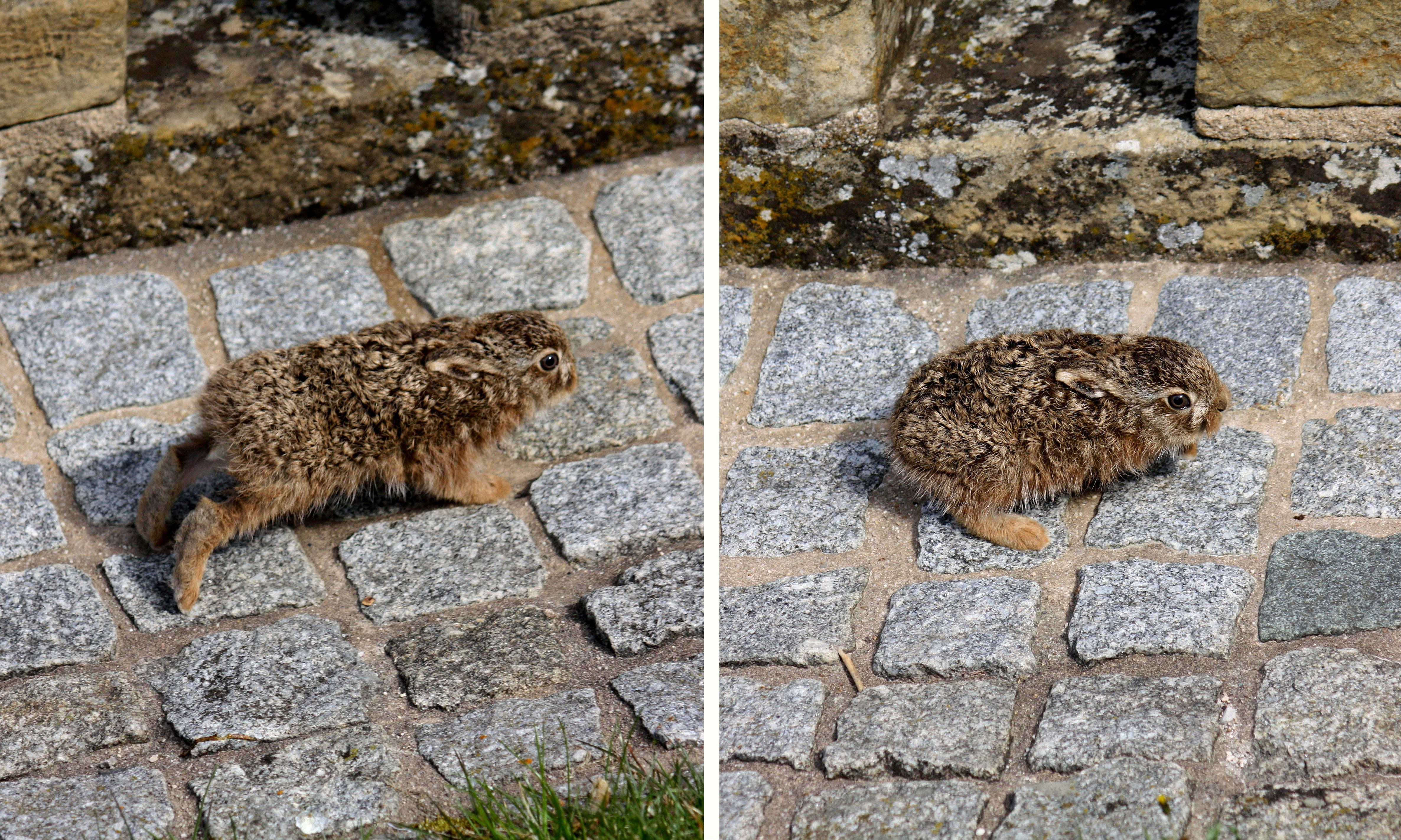 Bewegungsablauf bei einem jungen Feldhasen in Kloster Banz.